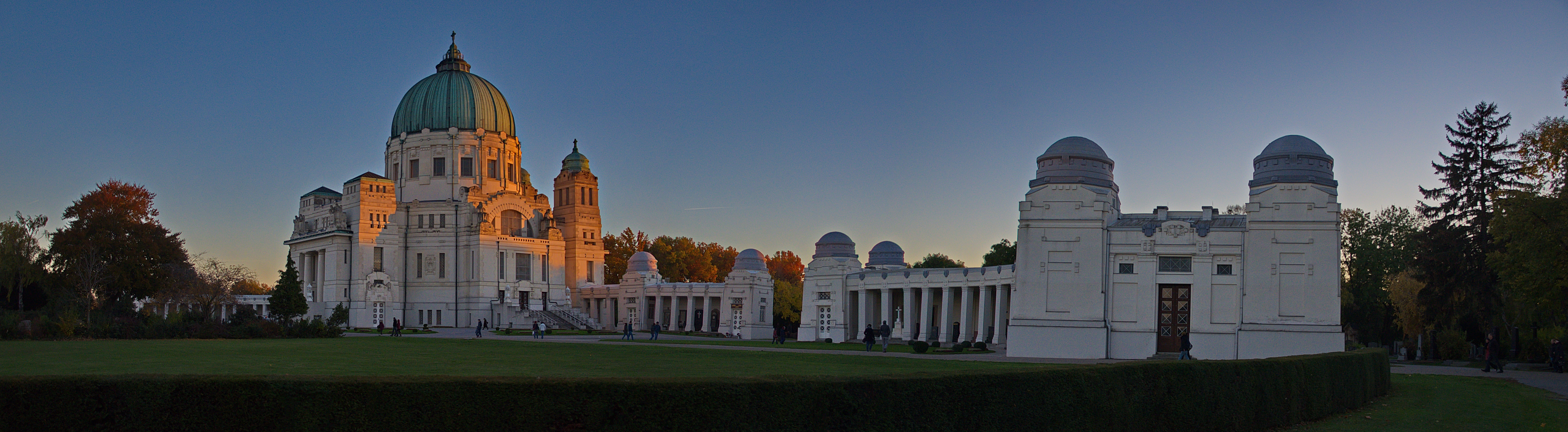 138 - Wien Zentralfriedhof 2015